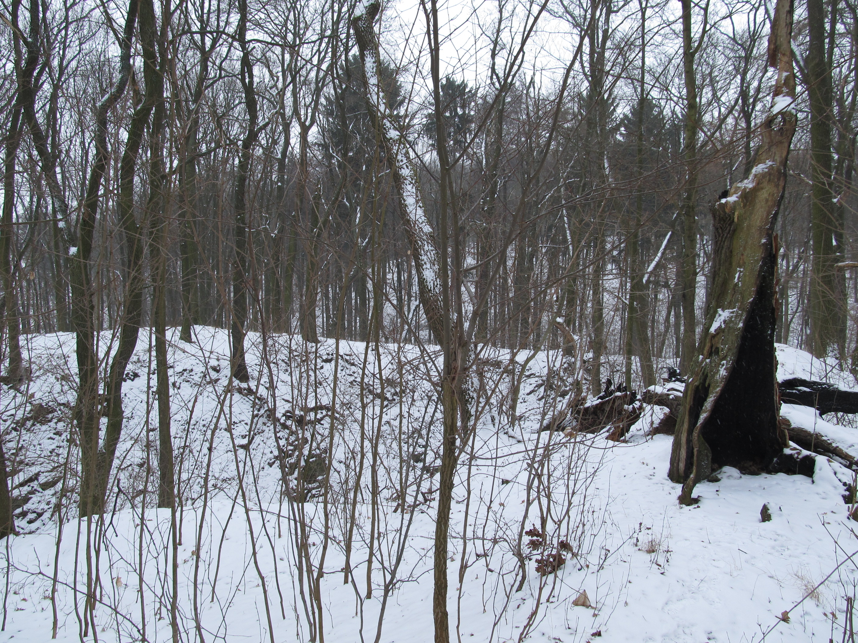 Vrtba (Vrtbo) - příkop a valy